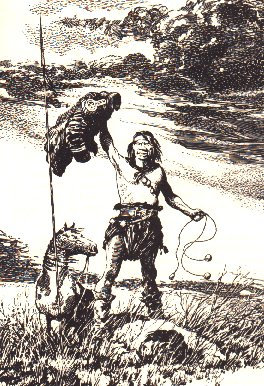 Cacique Olayon